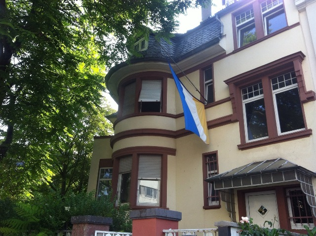 Verbindungshaus der katholischen Studentenverbindung KDStV Hasso-Nassovia Frankfurt am Main, Frankfurt am Main, 2015.